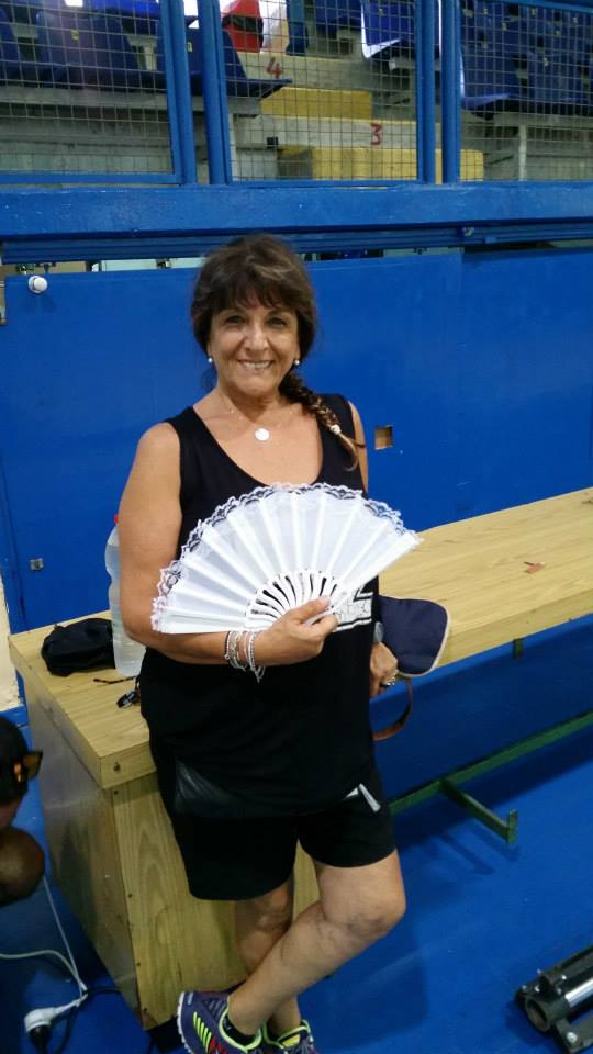 שוקי בפסטיבל כרמיאל 2014